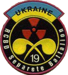 Нарукавний знак, 19-й окремий батальйон радіаційного, хімічного та біологічного захисту